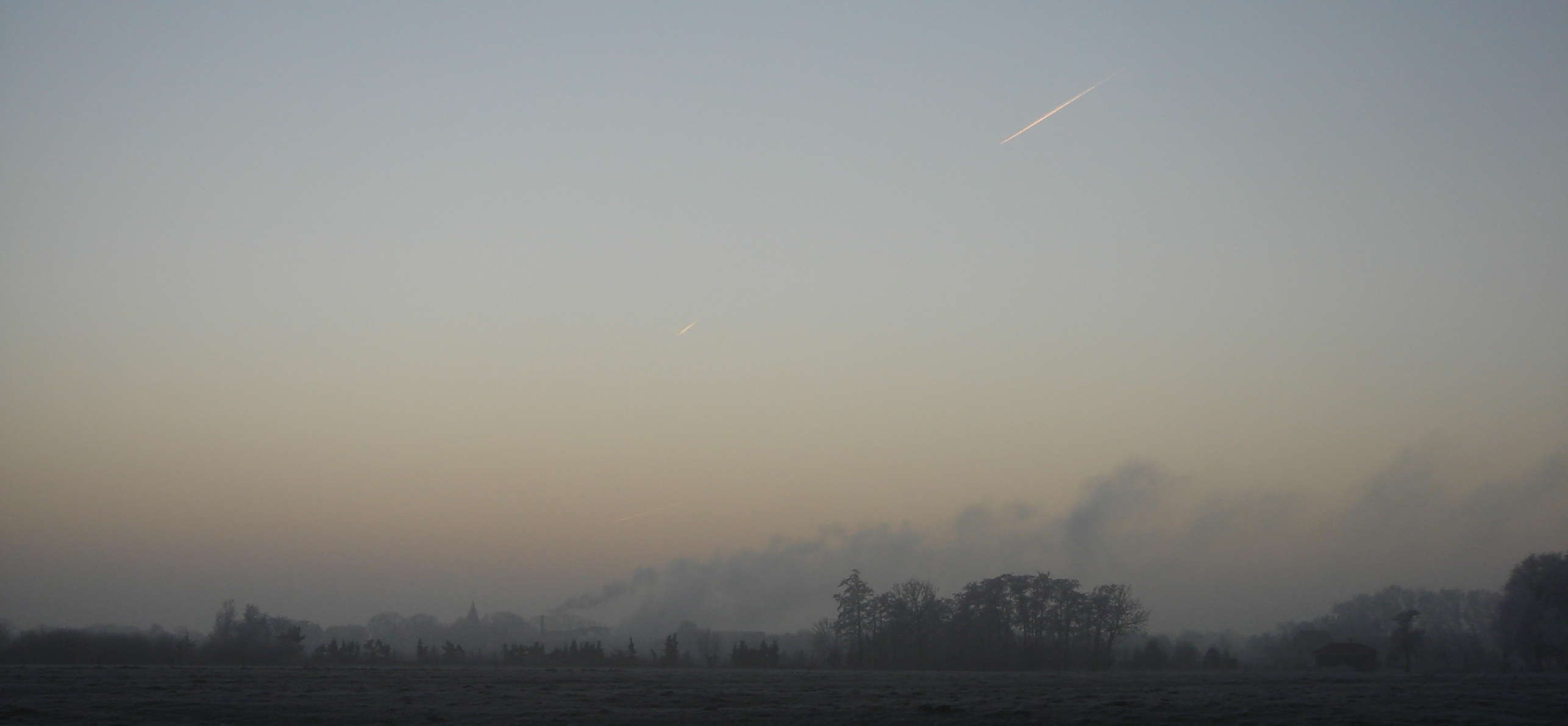 Neuenkirchen (Land Hadeln) an einem Wintertag aus Richtung Nordost gesehen. In der Mitte ist der Kirchturm zu sehen. Rechts daneben steigt Dampf aus einem Industriebetrieb auf.